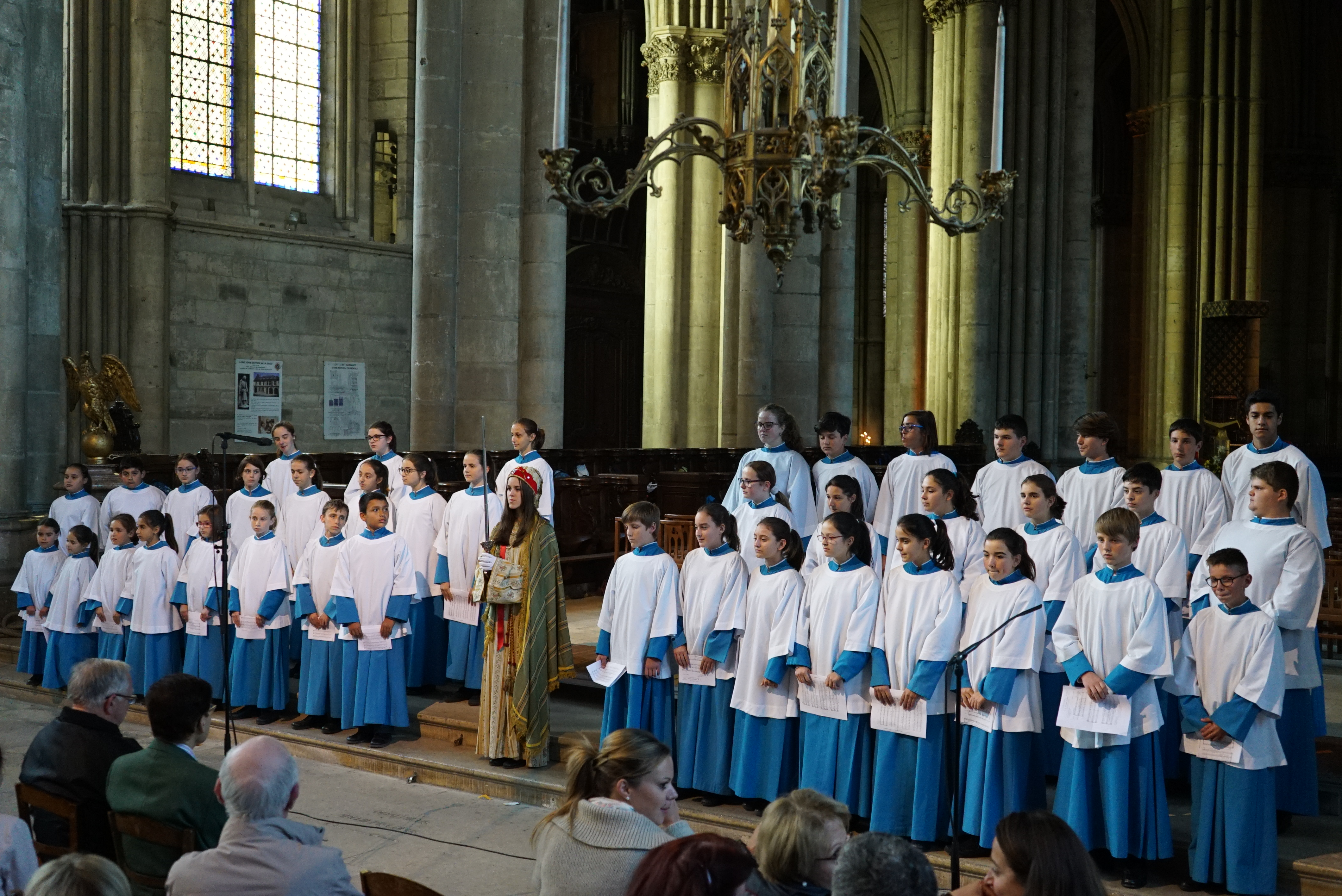 le chant de la Sybille donné par le choeur des bleuets de Lluc en la cathédrale de Reims.